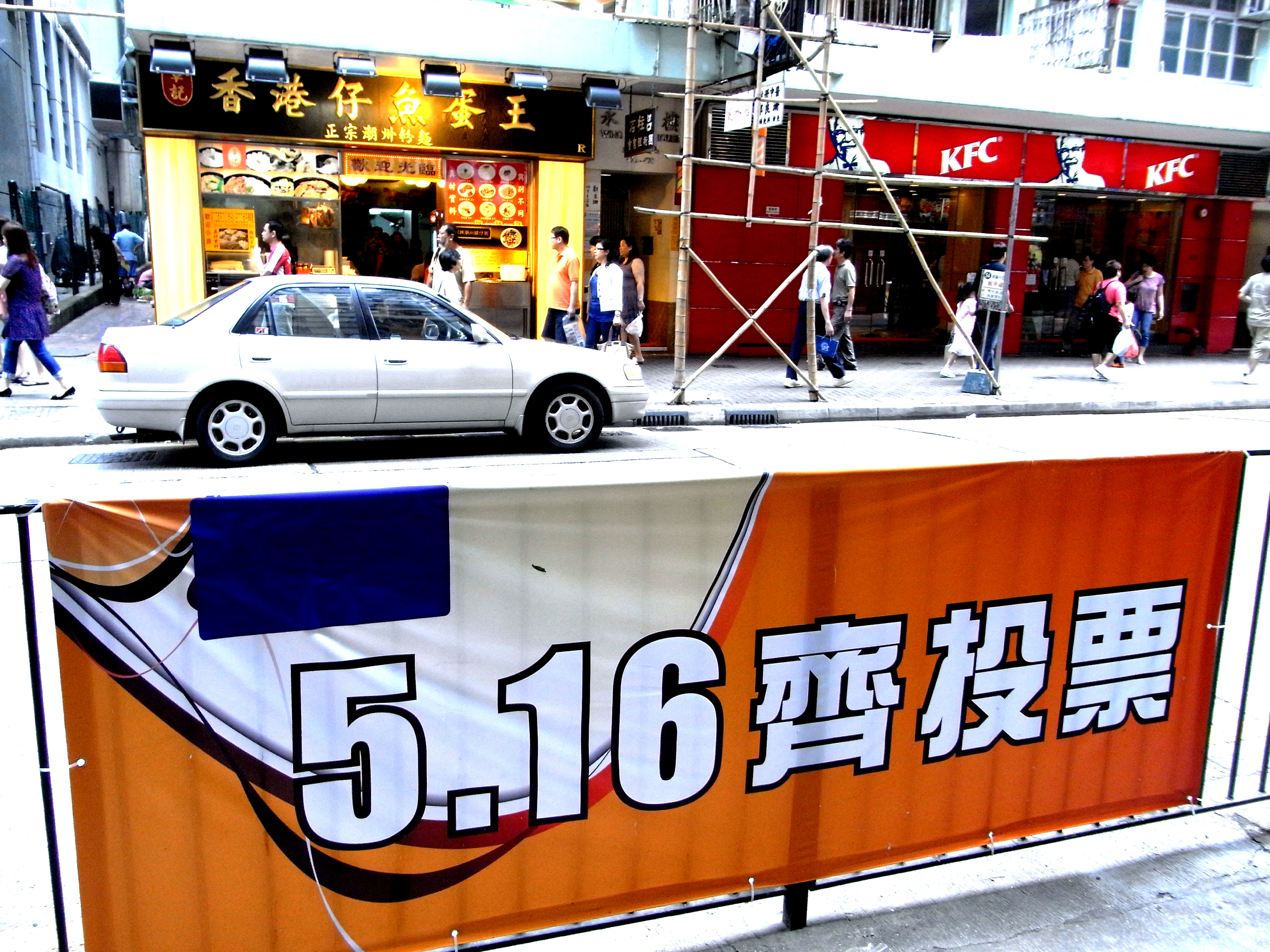 2010年香港立法會地方選區補選